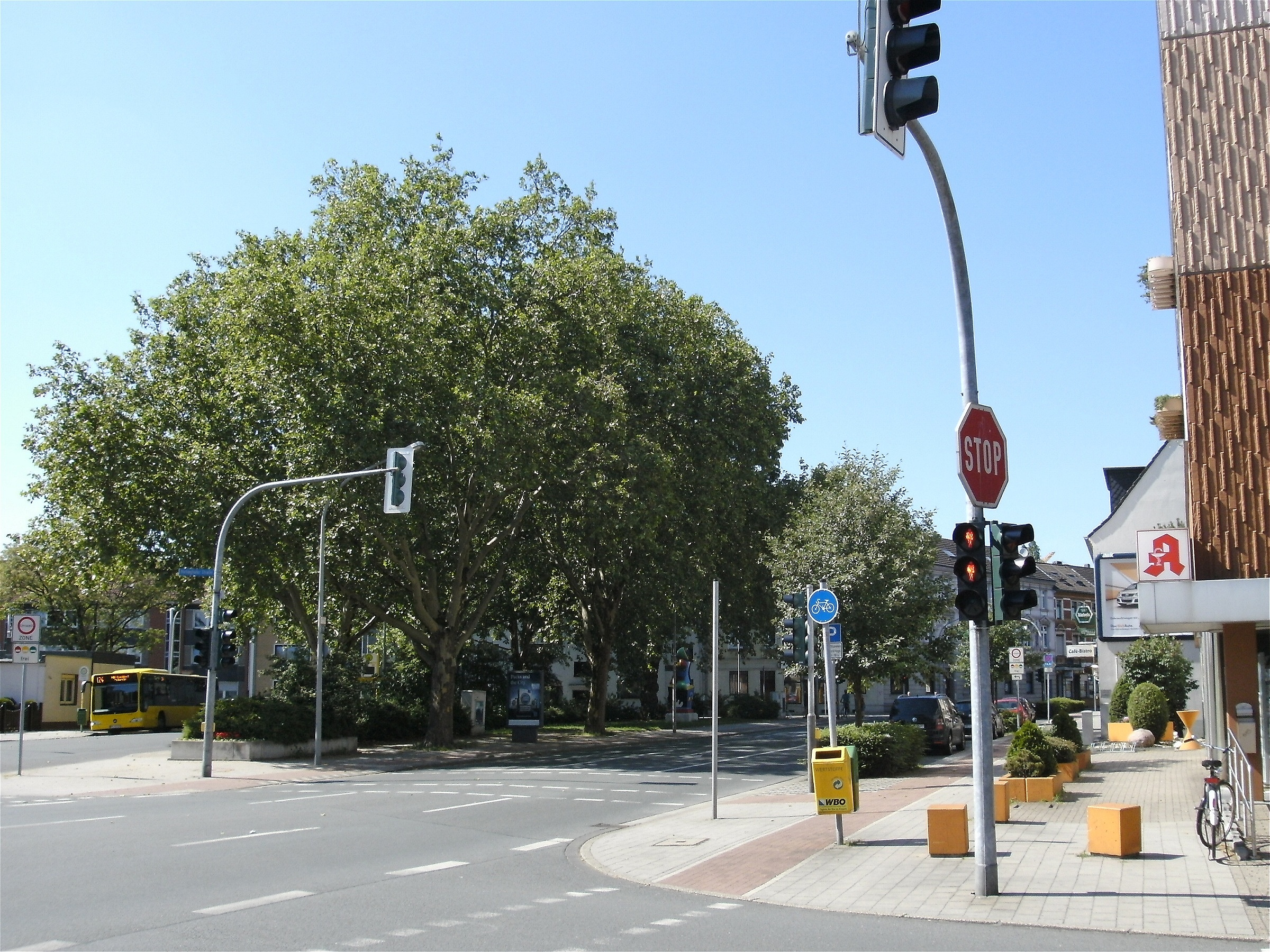 Wehrplatz in Oberhausen (Rhld.)